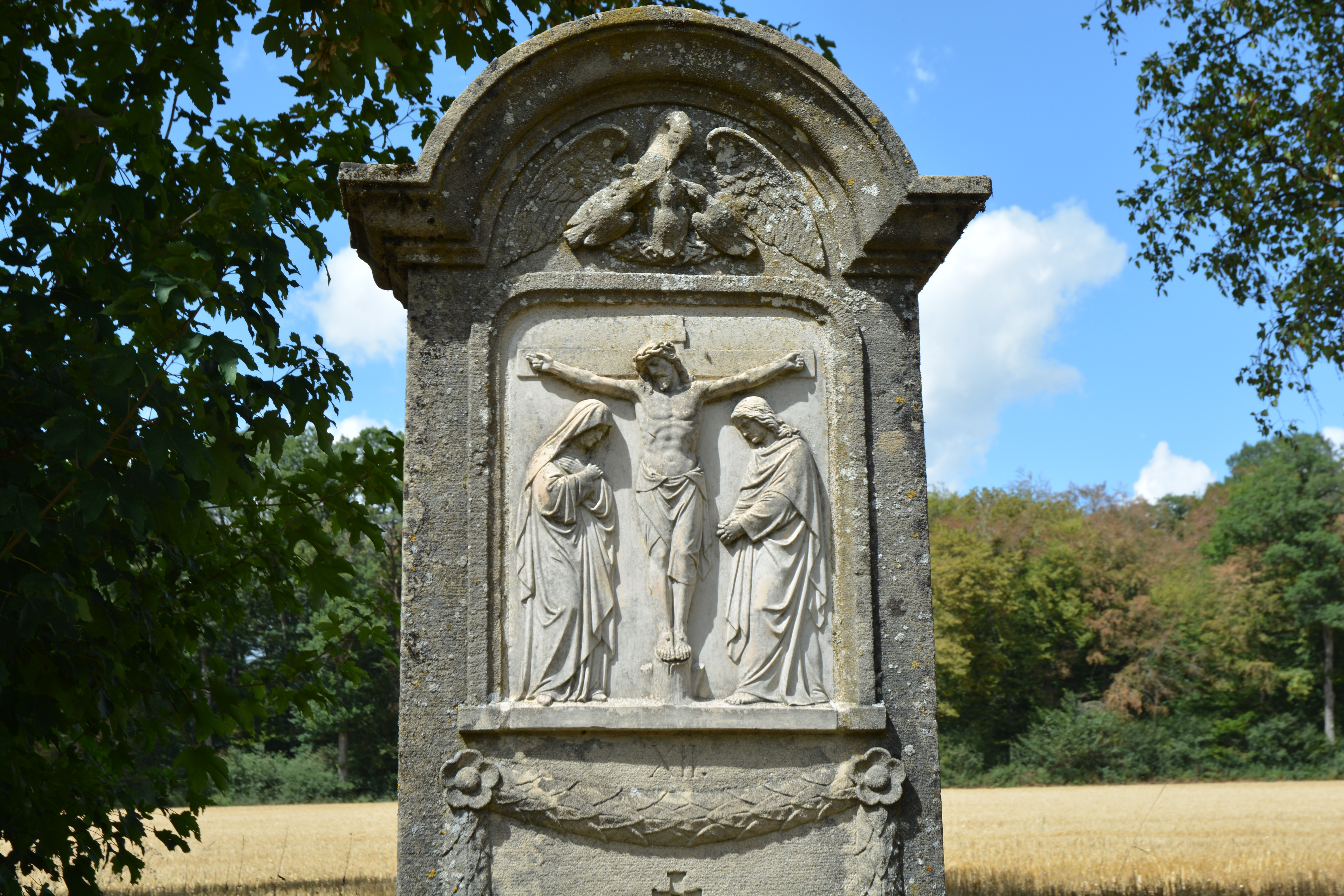 Kreuzwegstation auf dem Helperknapp bei Boevingen a.d. Attert (Luxemburg)